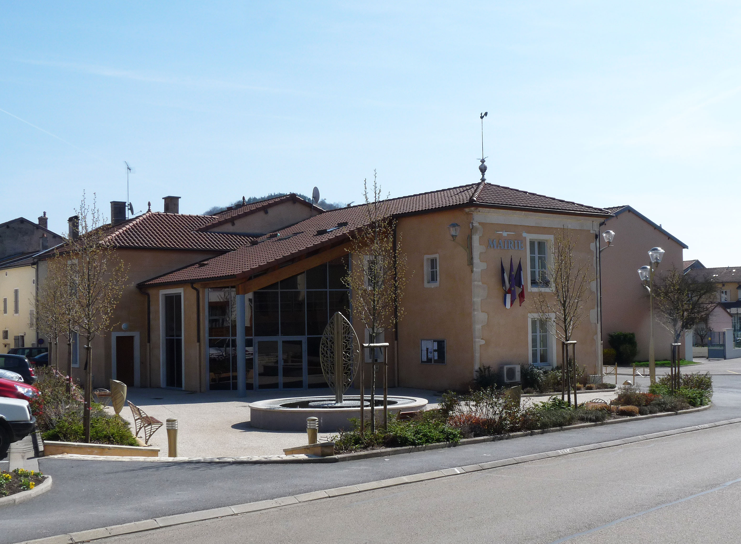 Poissons (Haute-Marne). Mairie.